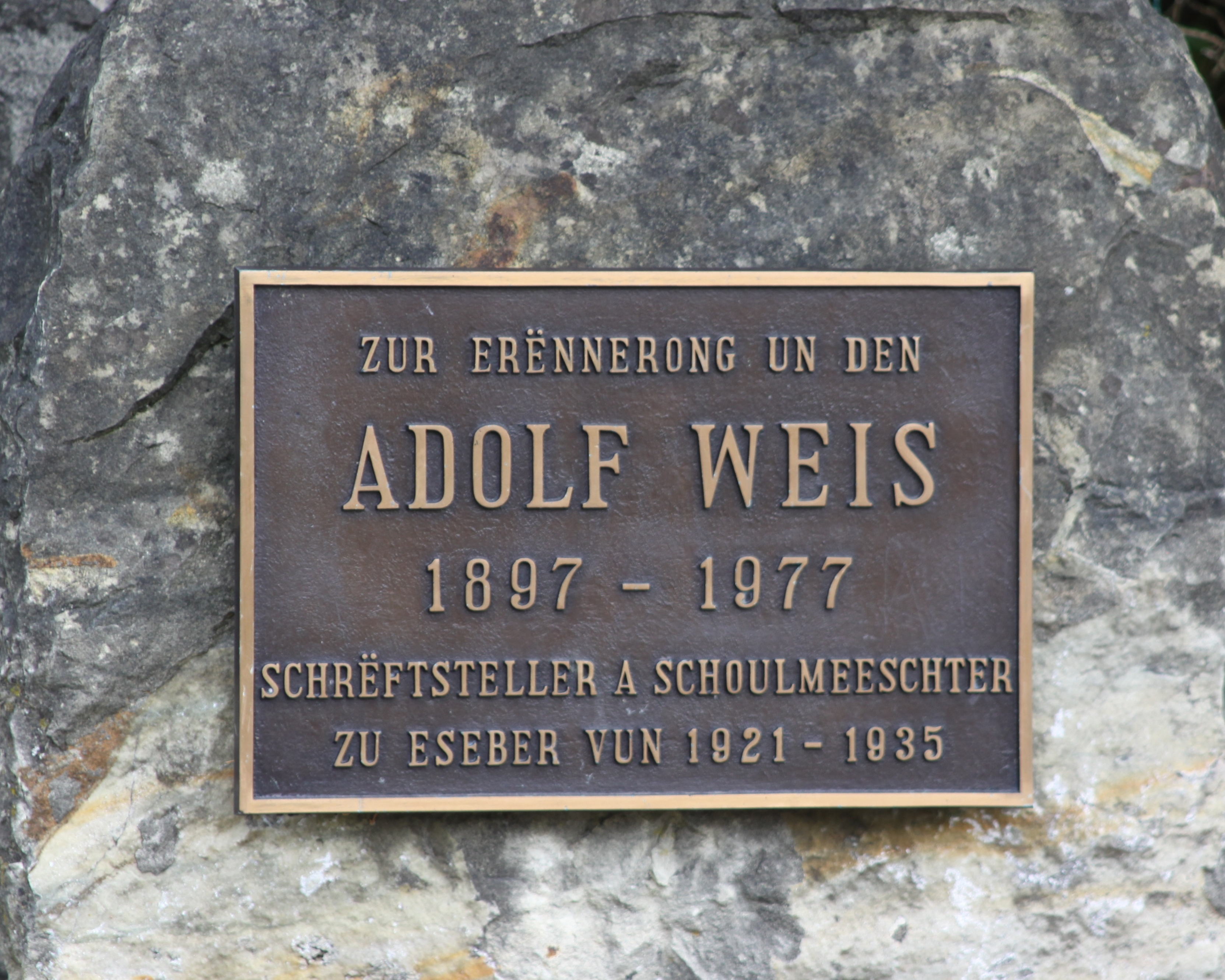 Adolf-Weis Plack zu Eesebur